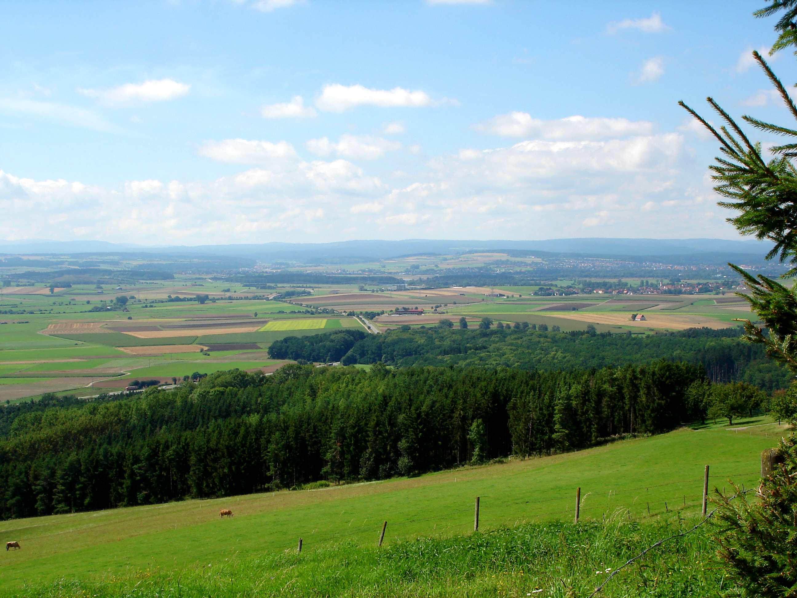 Deutschland: Blick vom Wartenberg auf die Landschaft der Baar und die Donau